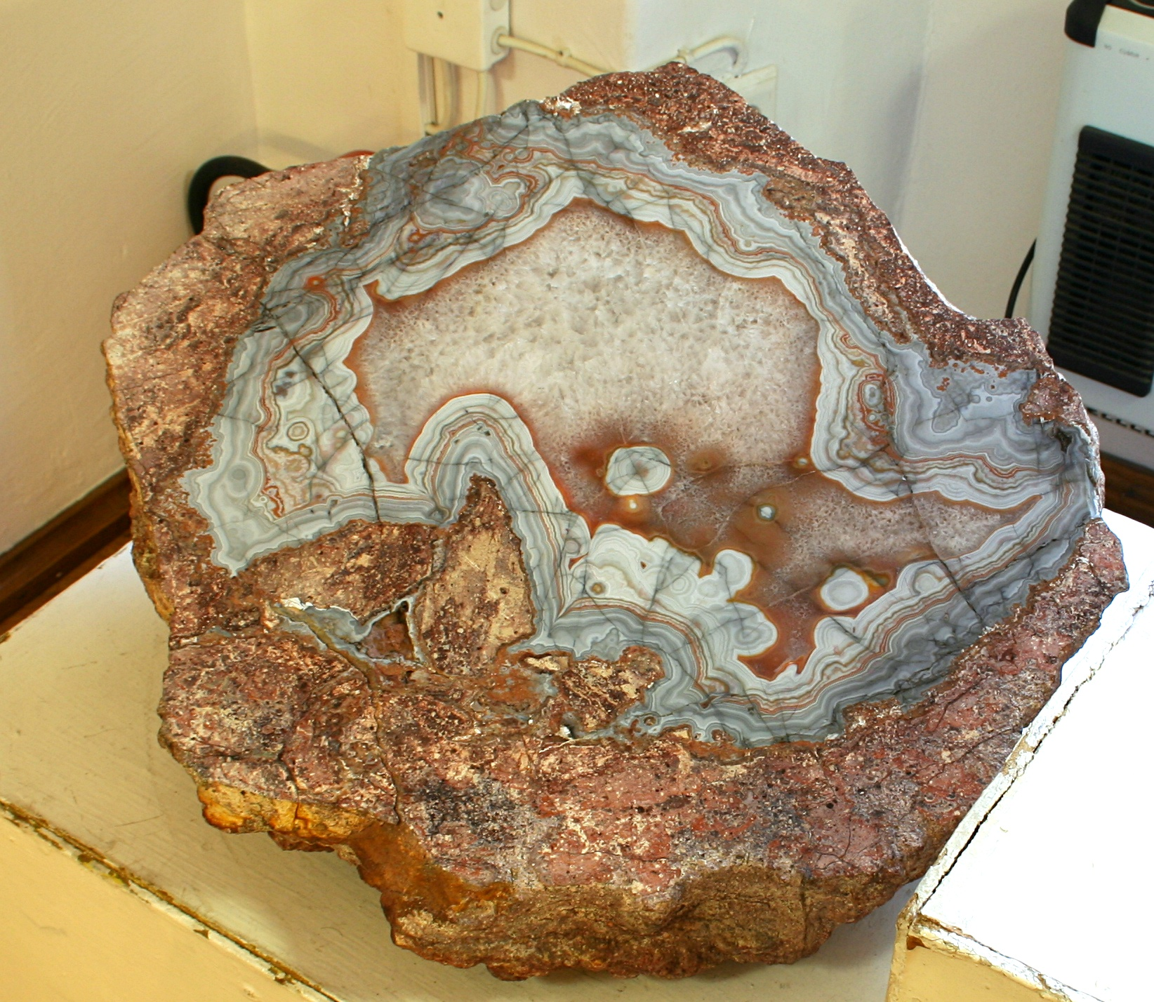 Agat ze wsi Nowy Kościół w Muzeum Złota w Złotoryi